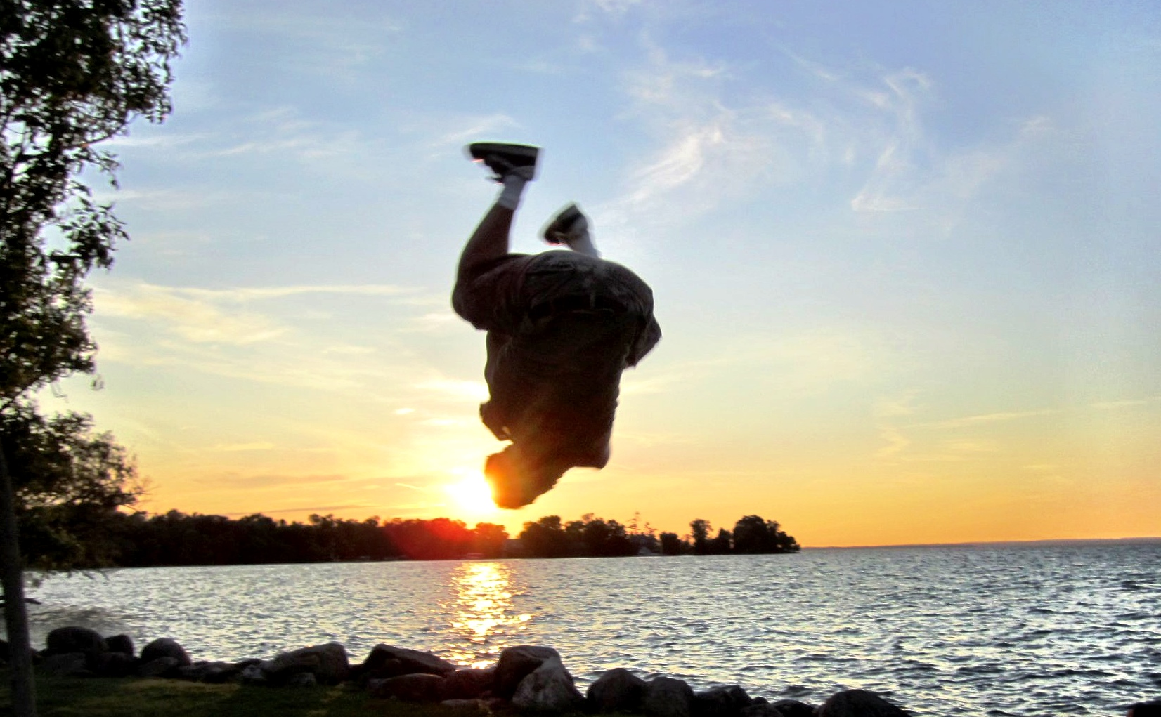 Joe Eigo in an Aerial Vortex Flip